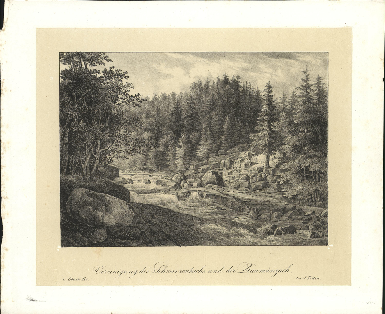 IdentificatieTitel: Vereinigung des Schwarzenbachs und der Raumünzach Objectnummer: A 58219Objecttype: prent Huidige locatie: in depotOnderwerpen: Duitsland landschap VervaardigingVervaardiger: Kaspar Obach (ontwerper) Johann Velten (uitgever) Datering: 1808 – 1848 Materiaal: papier Verwerving en rechtenVerworven: aangetroffen VerzamelingWillet-Holthuysen, collectieLicentie: CC PDNaamsvermelding: Amsterdam MuseumDuurzaam webadres